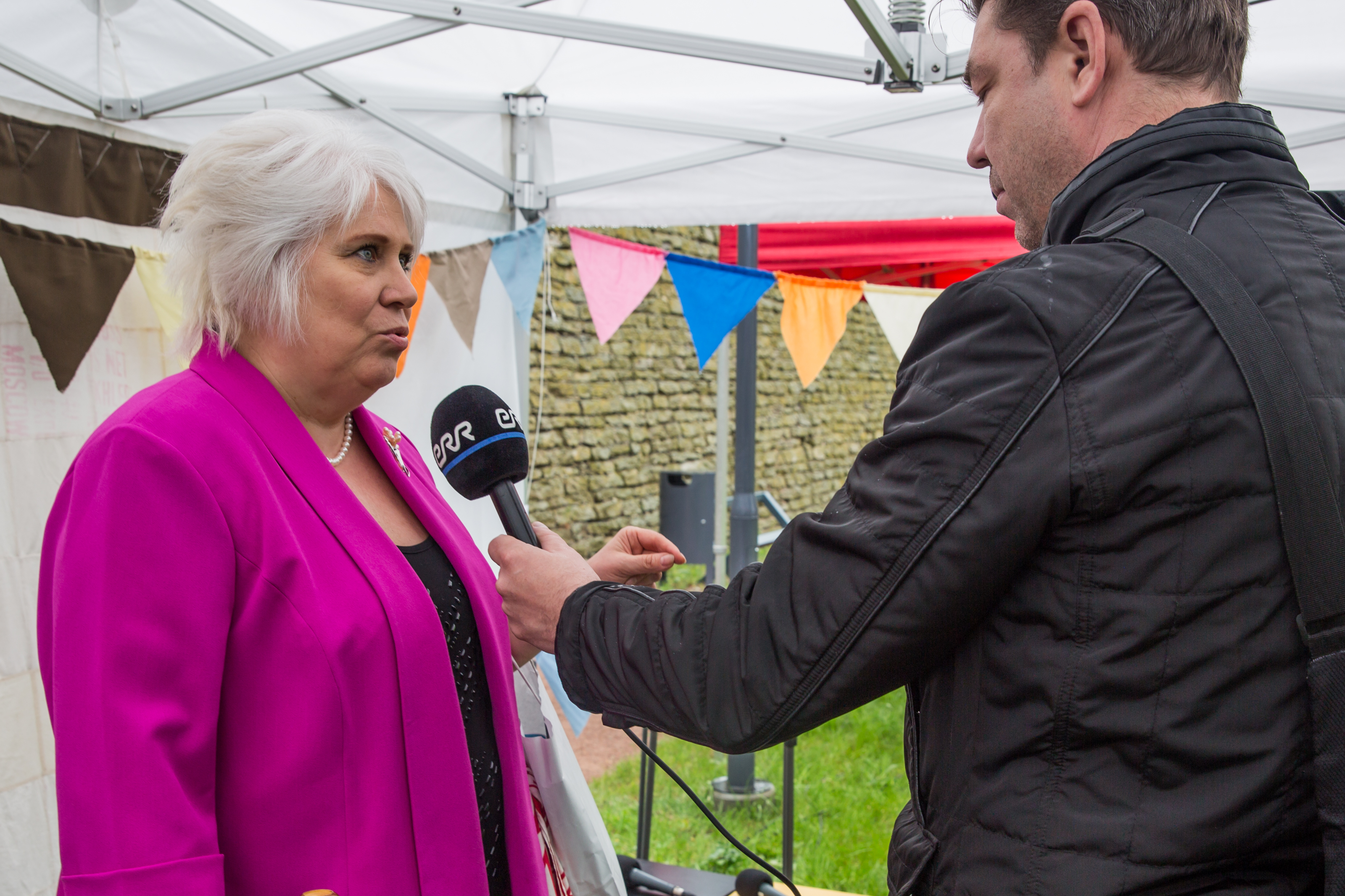 Marina Kaljurand Narva [eel]arvamusfestivalil.